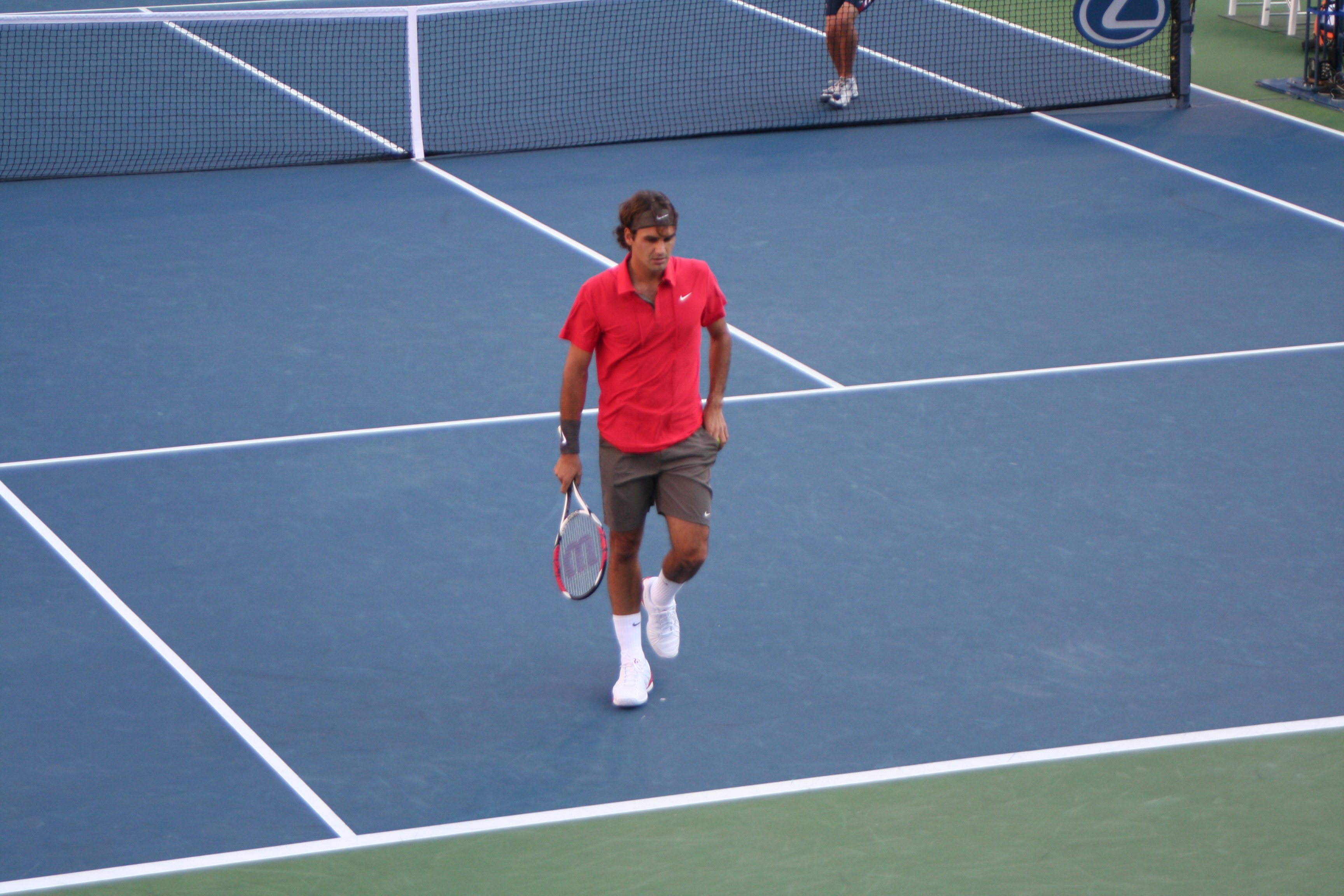 Roger Federer wins the US Open 2008